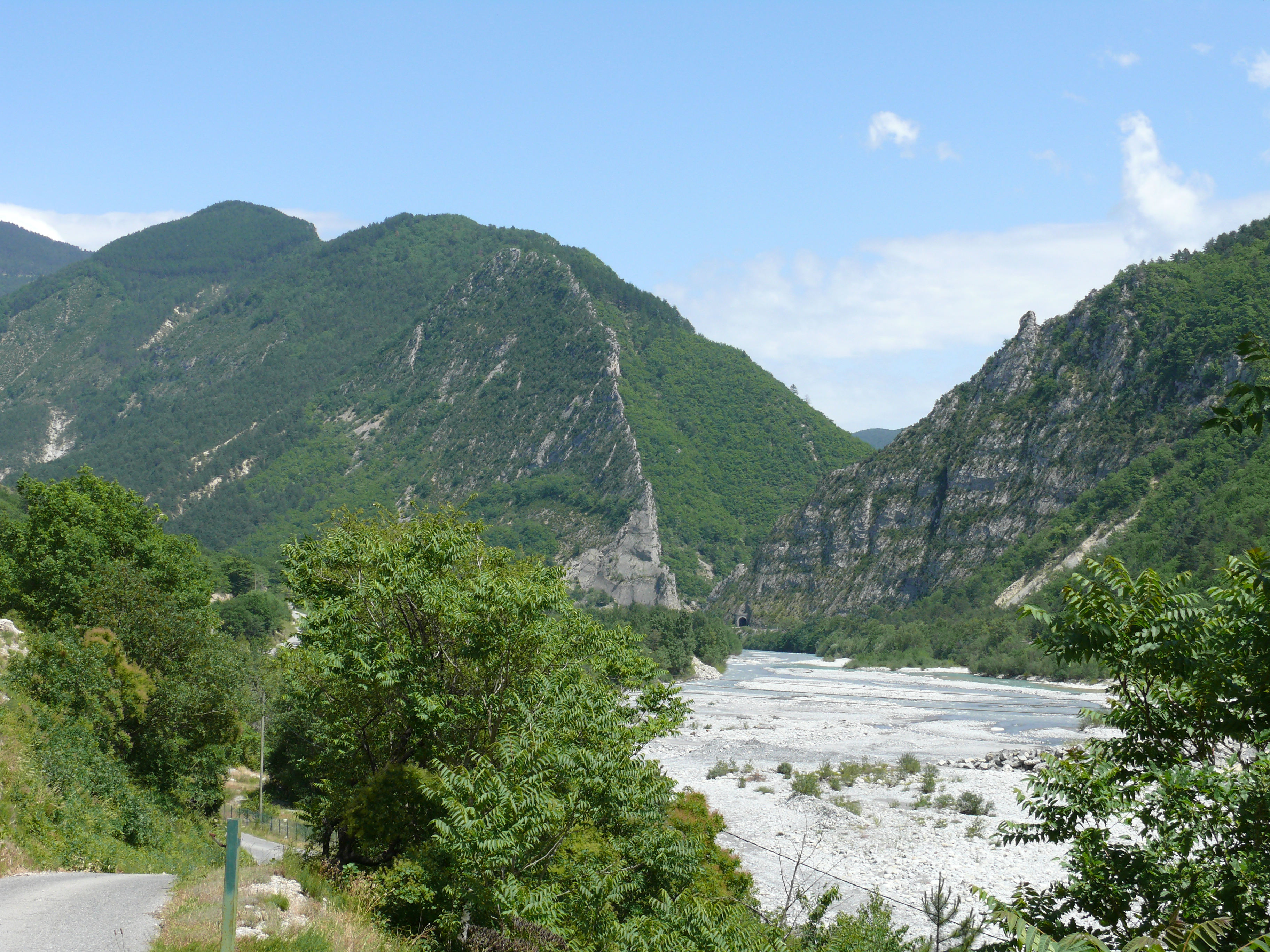 La vallée du Var près du pont de Gueydan